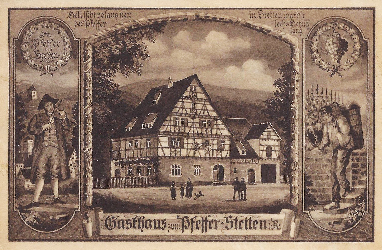 Gasthaus zum Pfeffer / Stetten im Remstal um 1910 - Text retuschiert